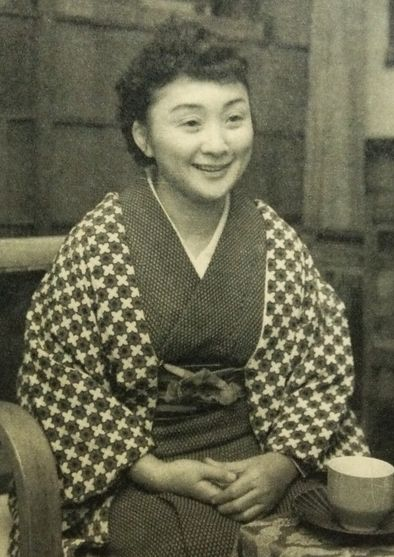 松原操